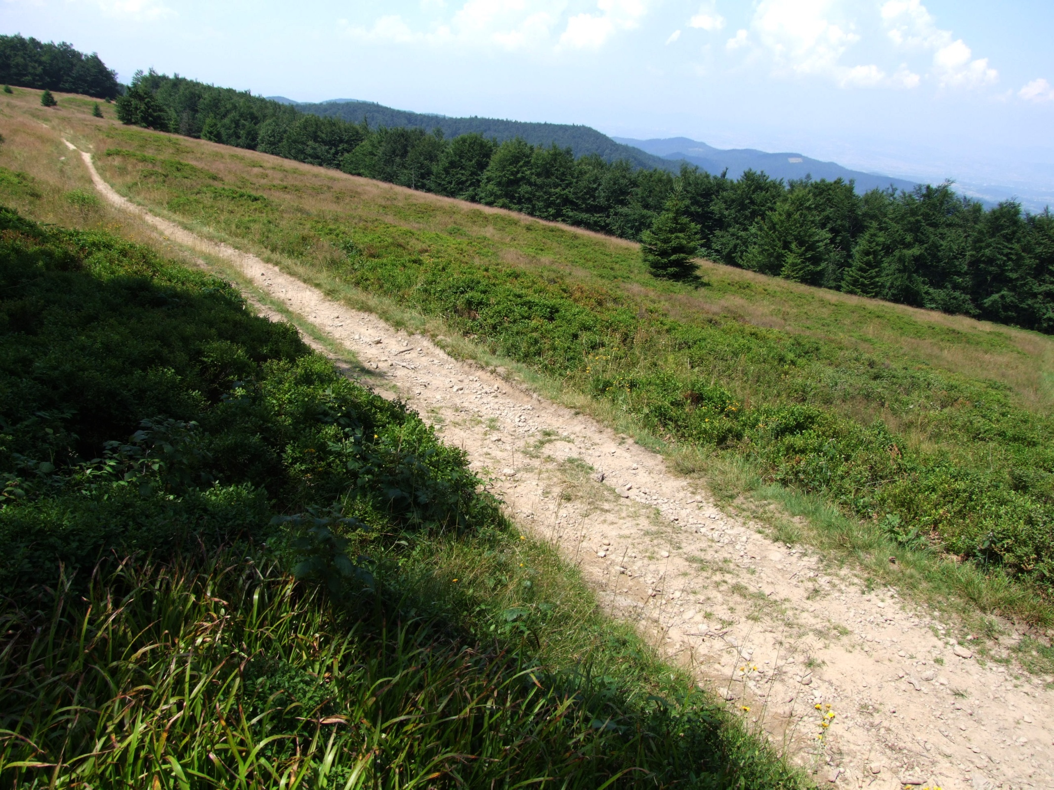 Hala Barnowska w Paśmie Jaworzyny